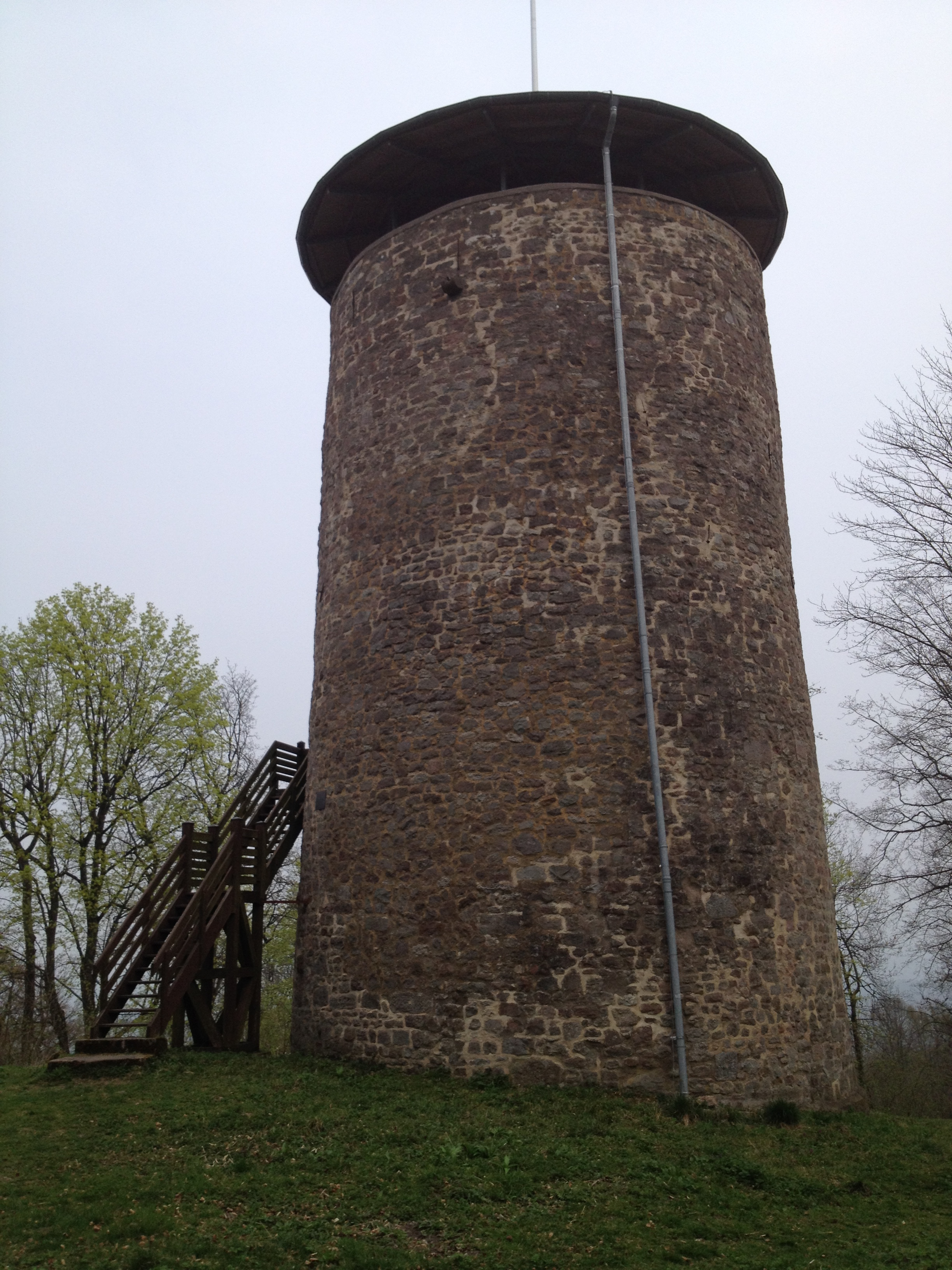 Überdachter Bergfried mit Aussichtsplattform der Burgruine Reichenbach; Grimmsteig